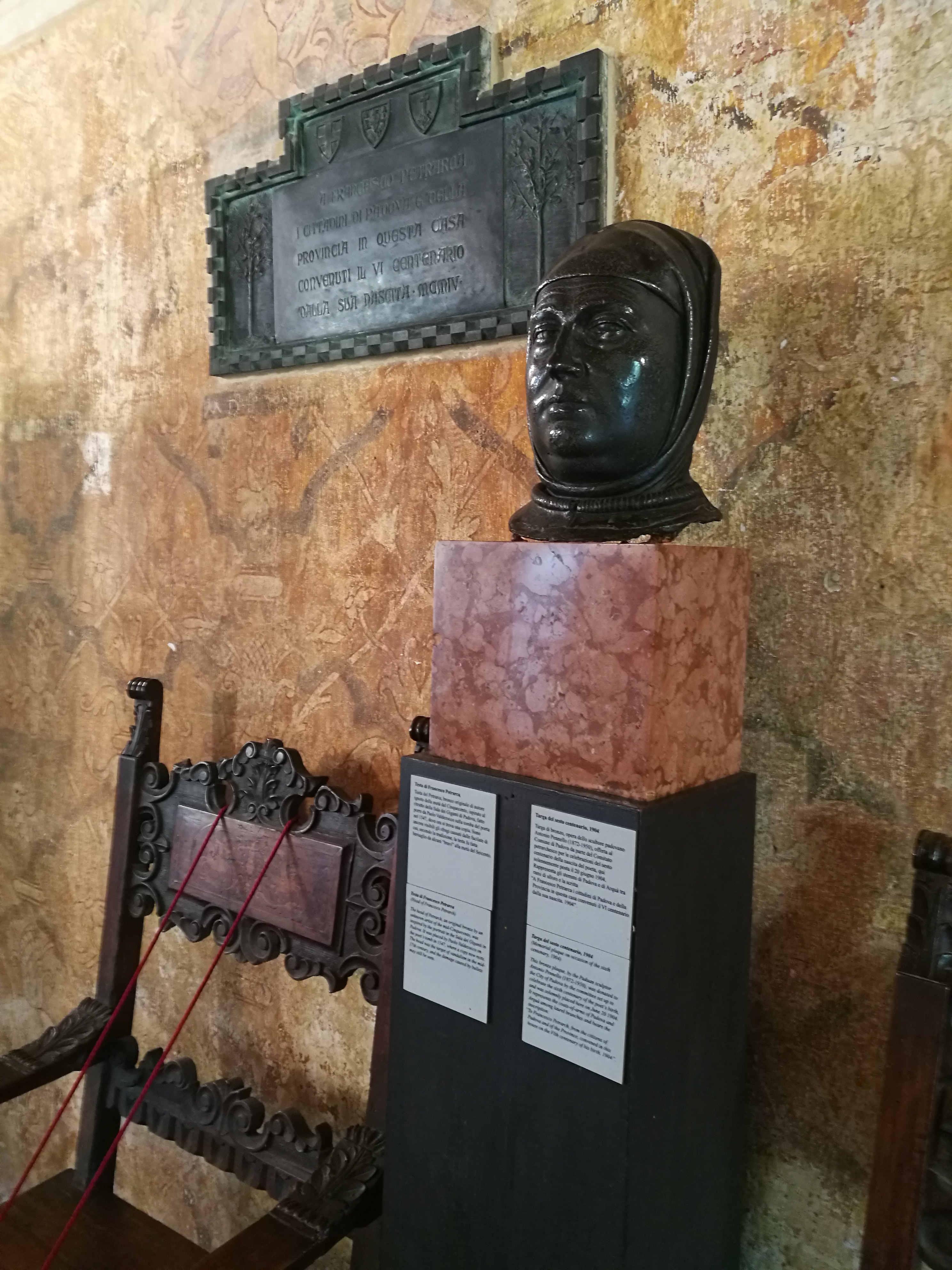 casa del Petrarca This is a photo of a monument which is part of cultural heritage of Italy.